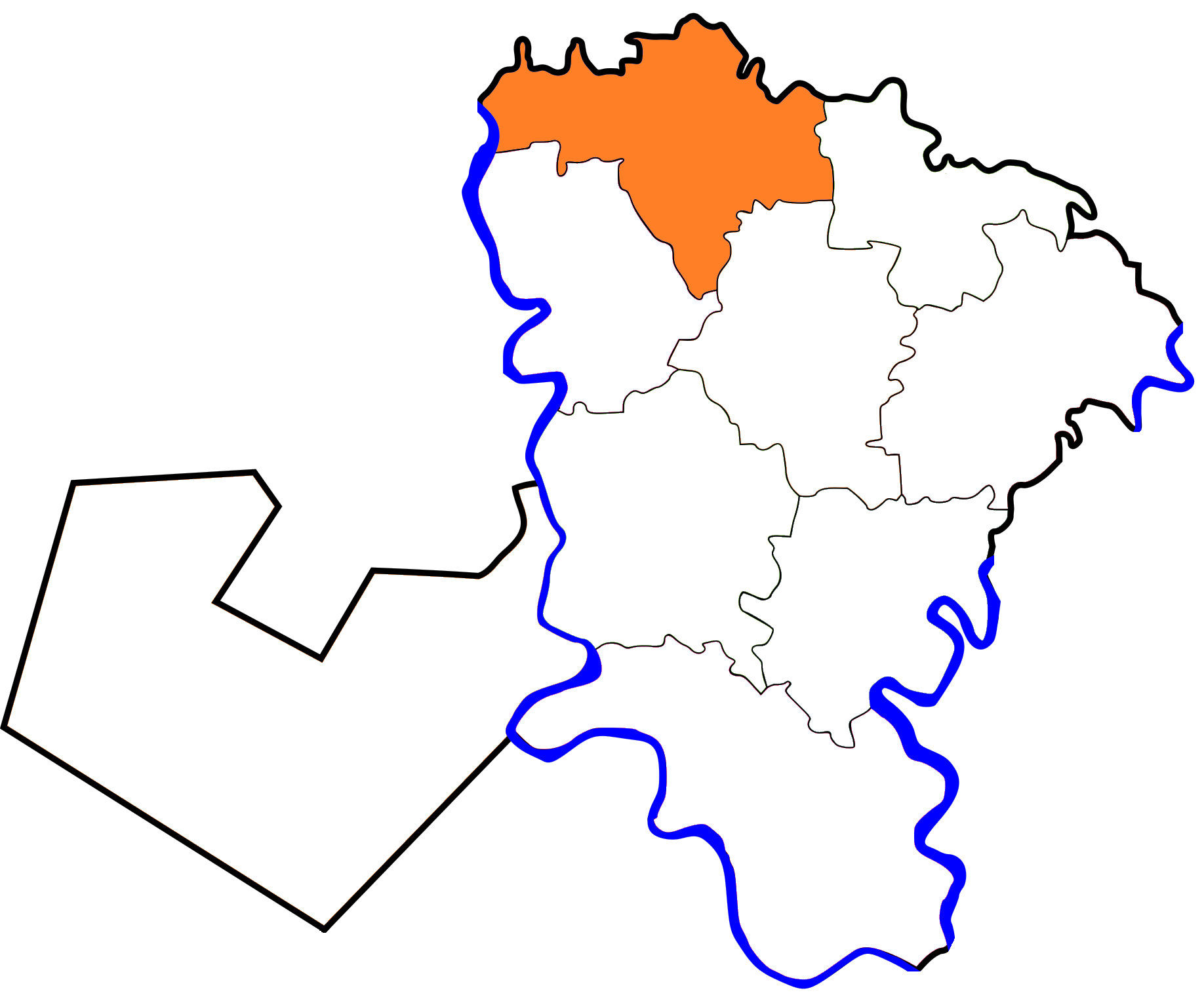 خريطة مركز تلا بالنسبة لمحافظة المنوفية، مصر.